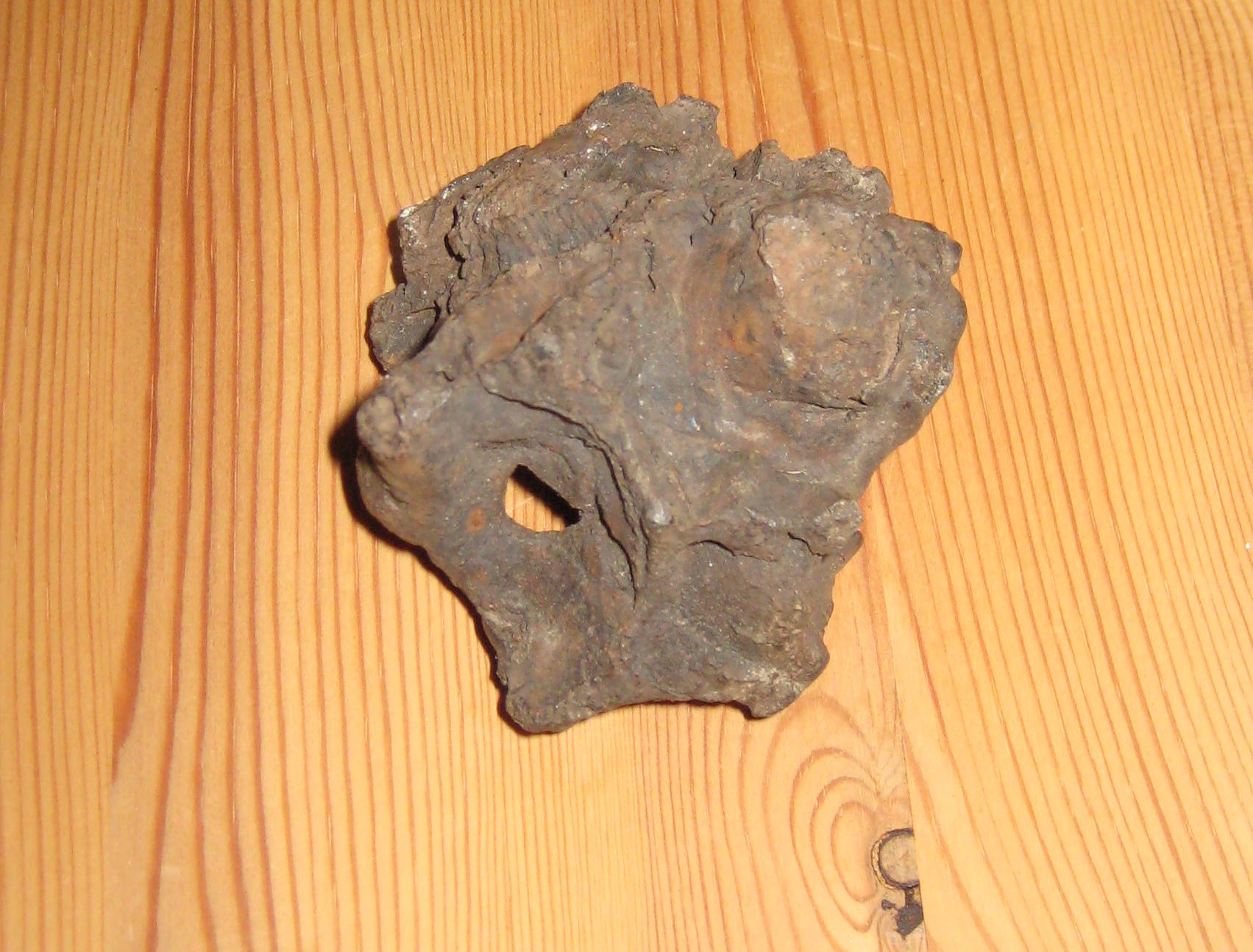 Slaggklump av myrmalm